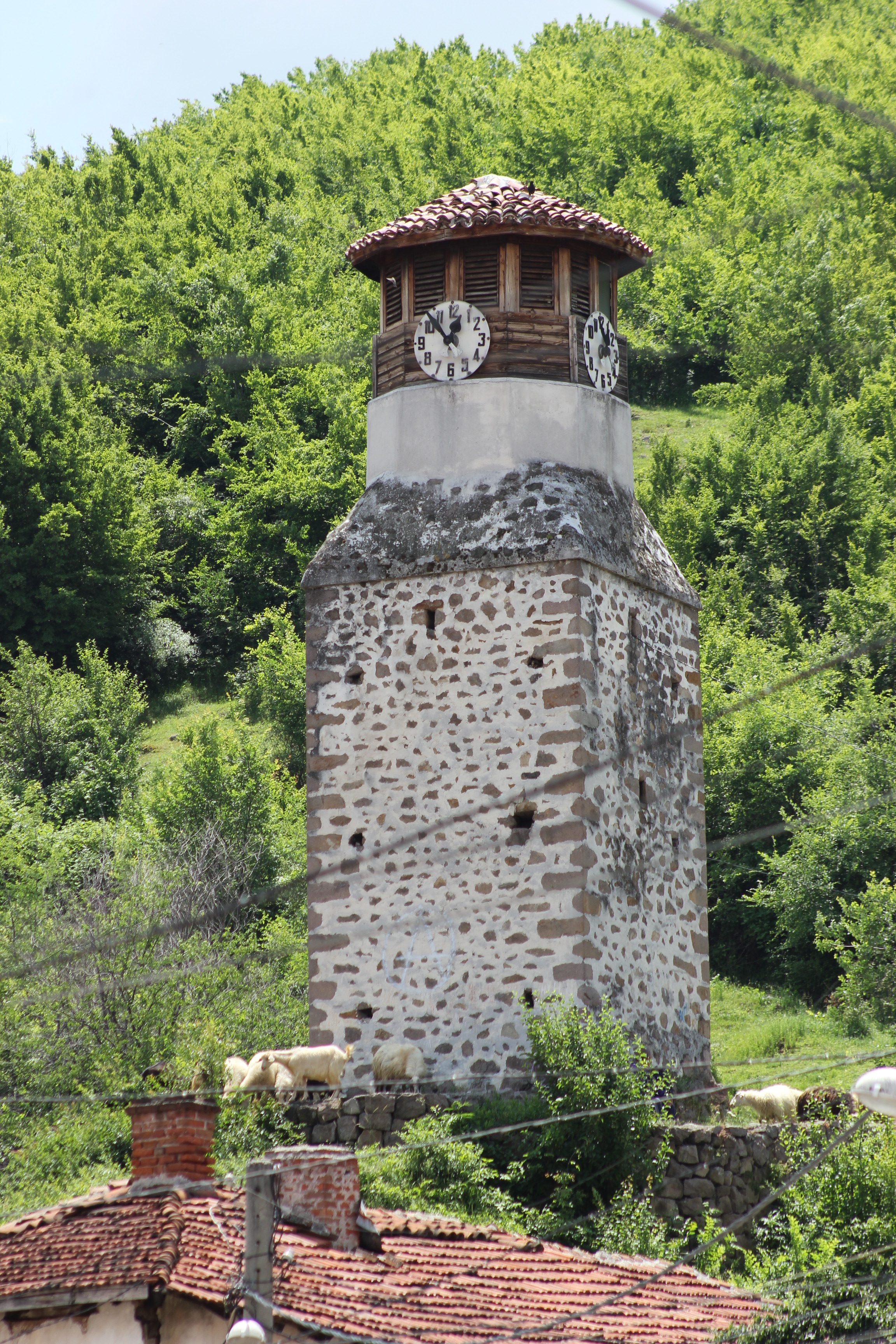 Часовниковата кула в град Пещера, България.